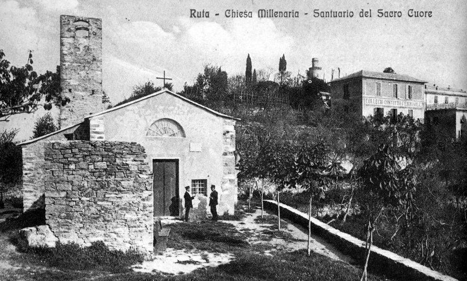 Fotografia dei primi anni del Novecento della chiesa millenaria di Ruta di Camogli, Liguria, Italia